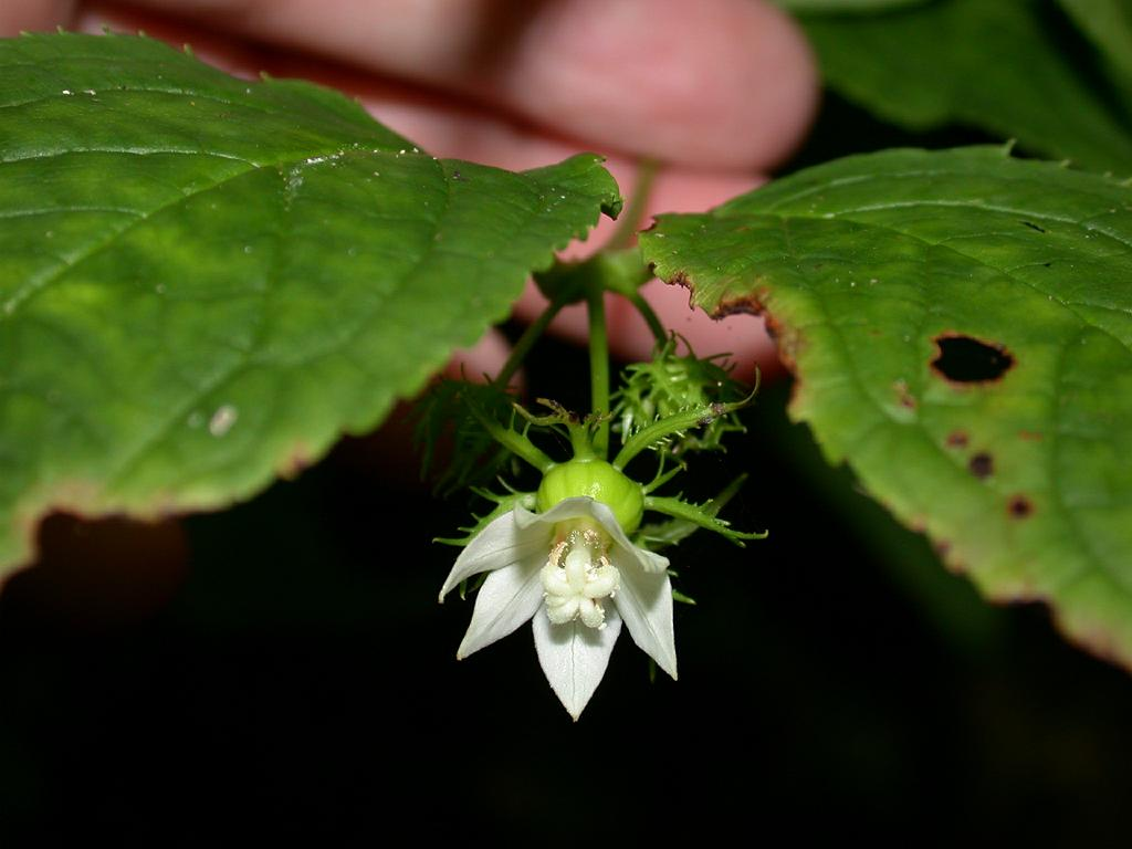 Codonopsis lancifolius：タンゲブ 2004/08/11 沖縄県那覇市：Naha City, Okinawa Pref. Japan